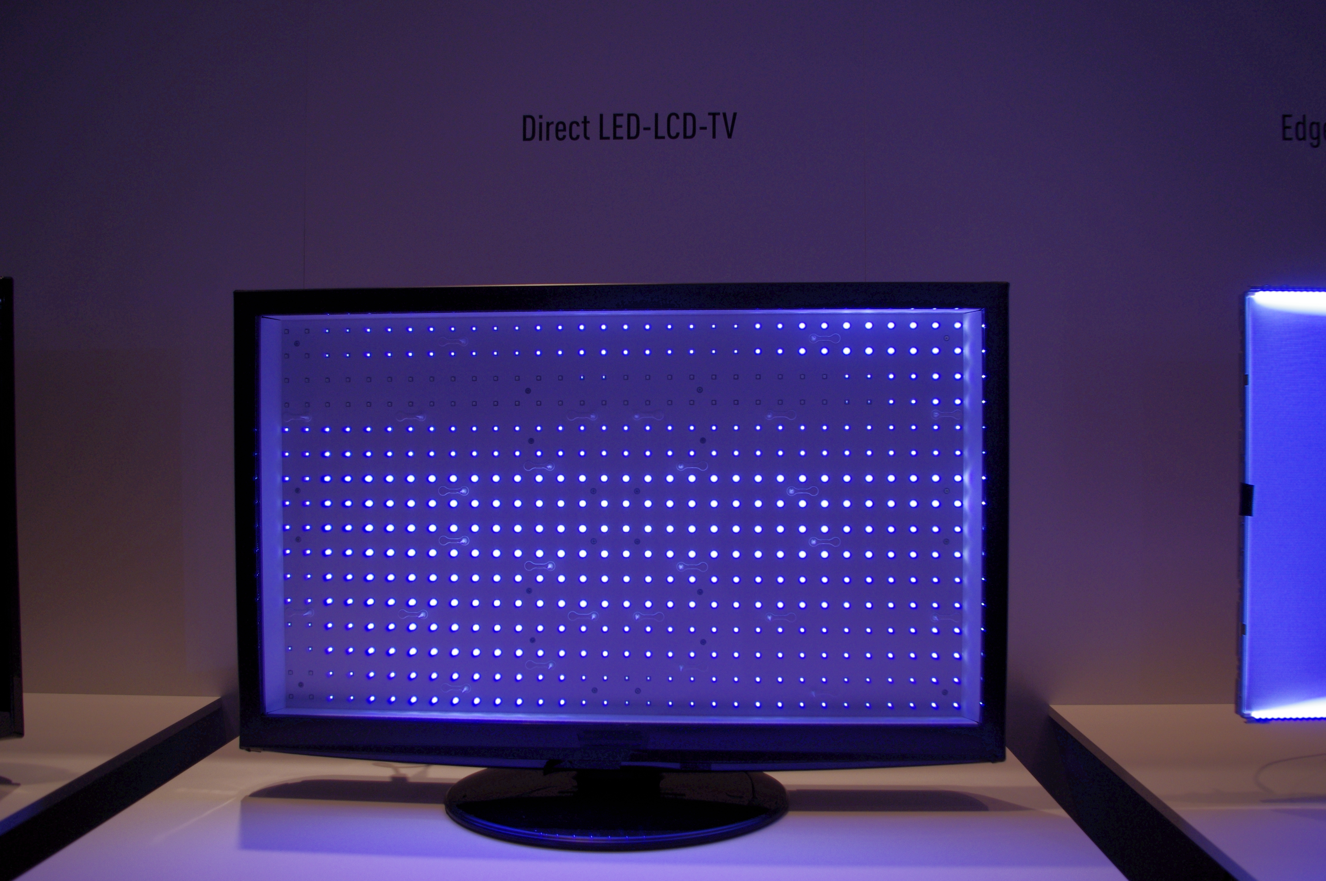 Bei diesem Panel wurden die LCD-Bildzellen entfernt, damit ein Blick auf die Hintergrundbeleuchtung möglich wird.